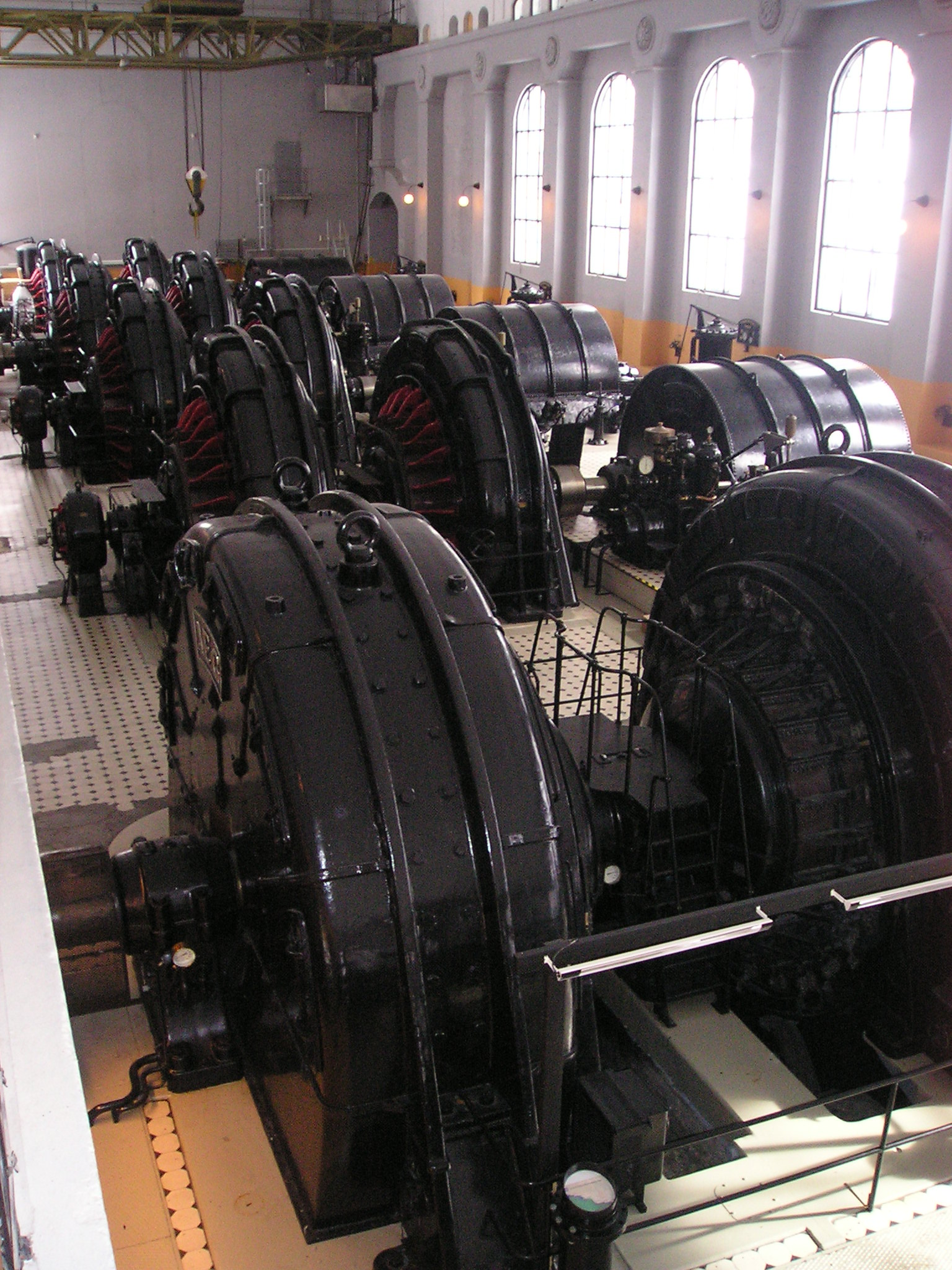 Photo: Hallvard Straume